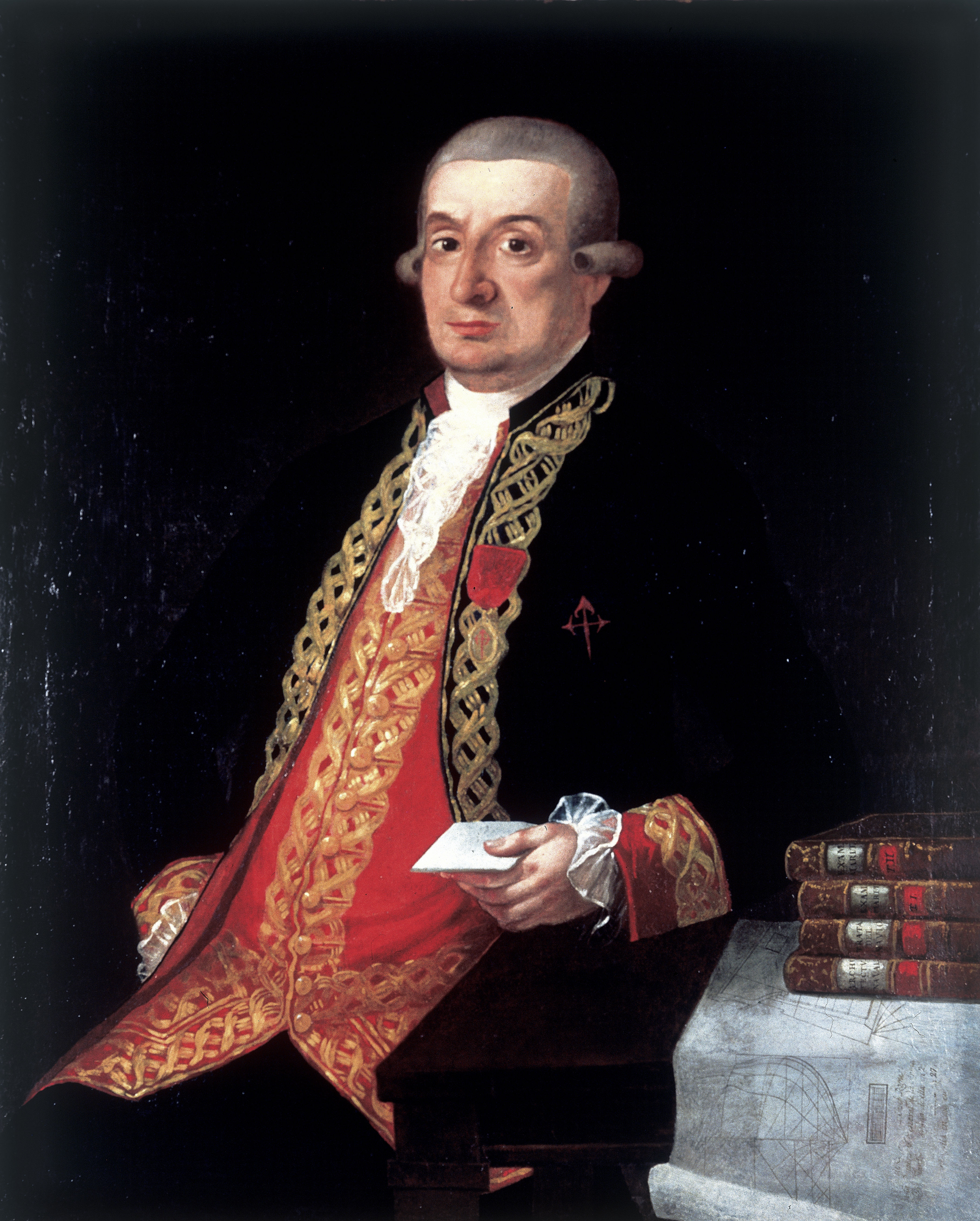 Retrato del José Joaquín Romero y Fernández de Landa (1736-1807), que fue caballero de la Orden de Santiago y teniente general de la Real Armada Española. El retratado aparece sentado, mirando a su derecha, con su codo izquierdo apoyado sobre una mesa con libros y sosteniendo un papel con su mano derecha. Y viste el uniforme grande de jefe de escuadra de la Real Armada Española y luce en su pecho la venera y la cruz de la Orden de Santiago. Esta obra ya figura en el catálogo del Museo Naval de Madrid de 1853, y fue restaurada en 1993.